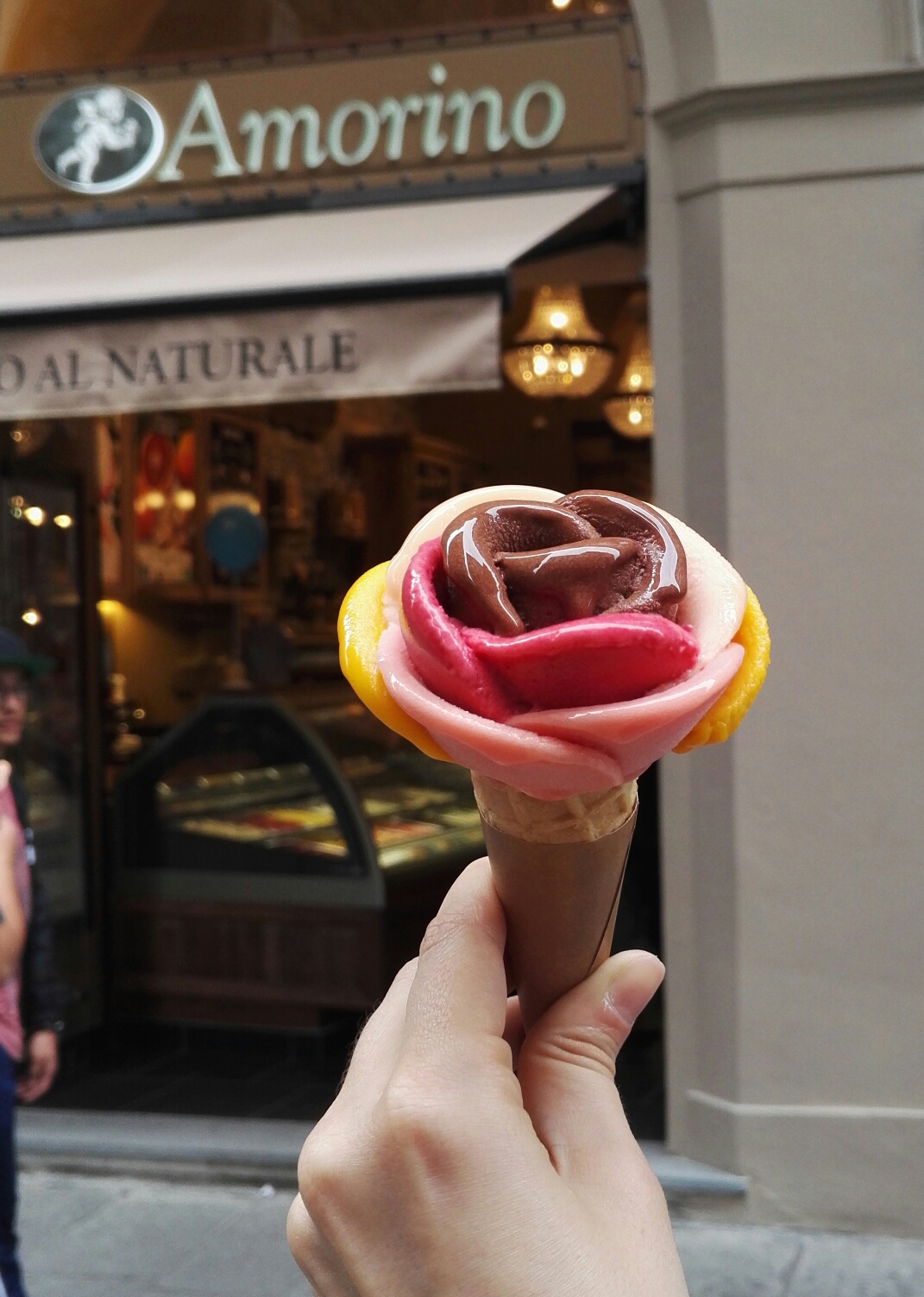 Un exemple de création à partir de crèmes glacées et de sorbet Amorino.